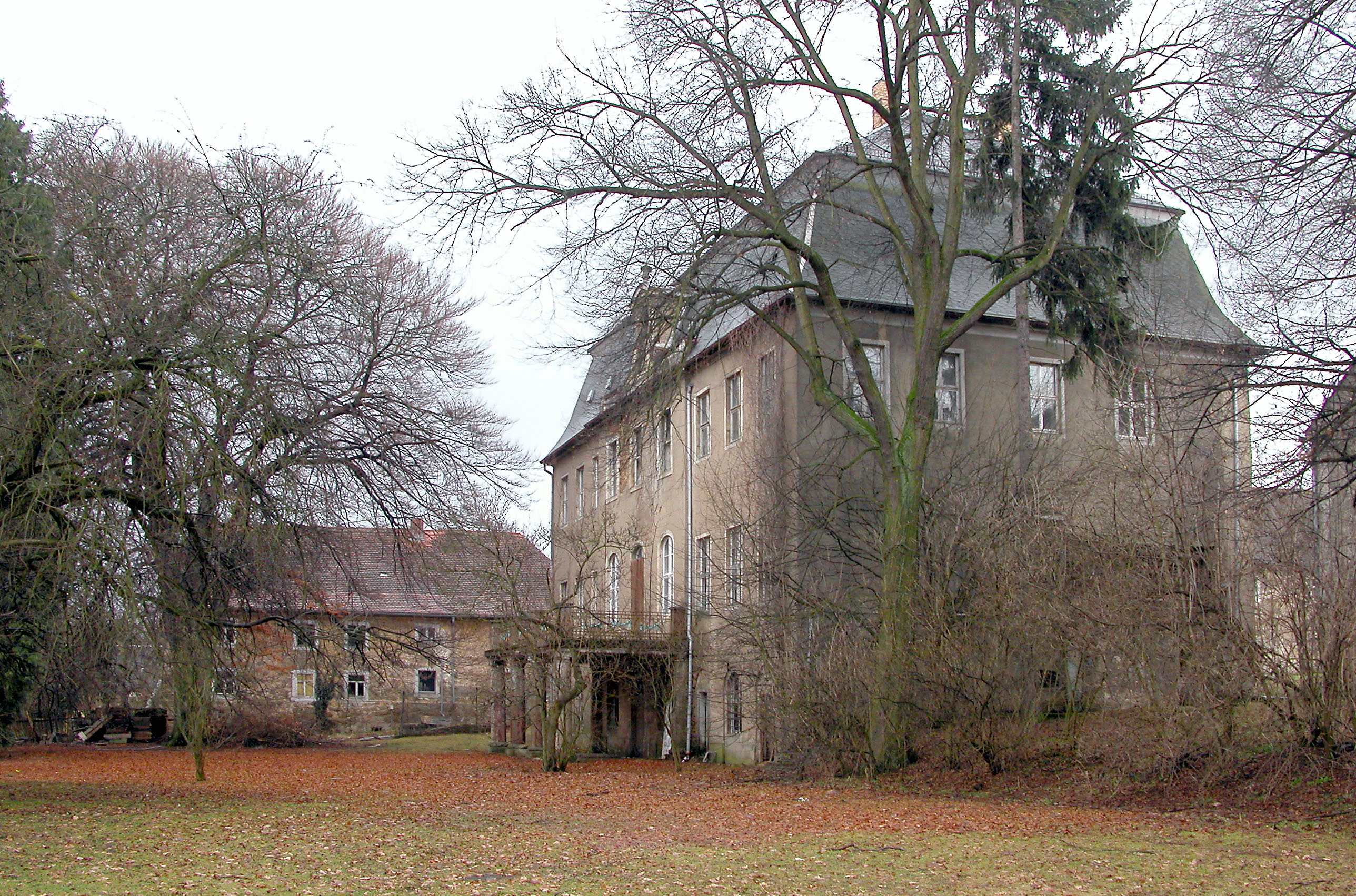 01.04.2006 01877 Schmölln (Schmölln-Putzkau), Am Rittergut 1: Schloß, errichtet 1748 bis 1750 unter Johanna Dorothea Matthaei. In der DDR Kulturhaus mit Heimatmuseum, Bibliothek, Kindergarten und Galerie. 1994 privatisiert. Sicht von NO, Parkseite. [DSCN9263.TIF]20060401140DR.JPG(c)Blobelt